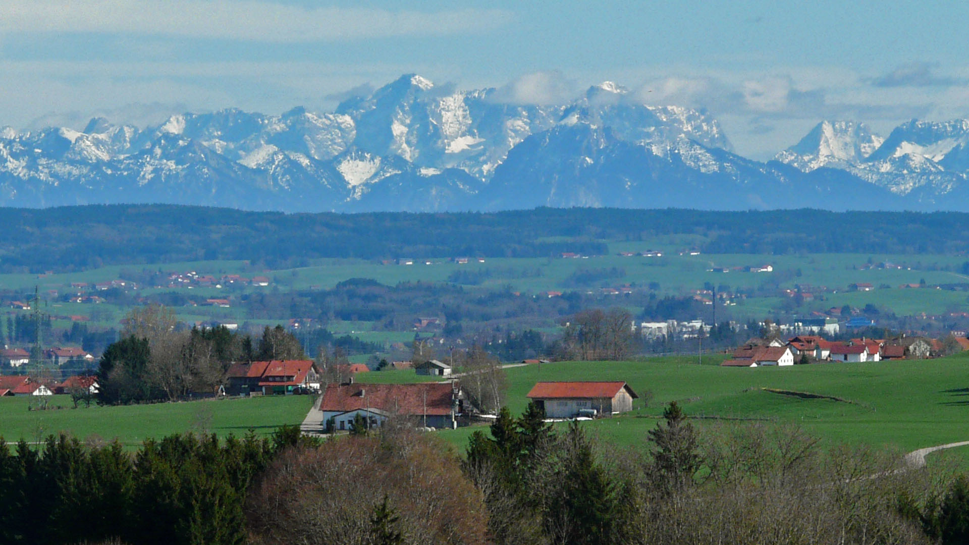 Sachsenried gegen Zugspitze, Dietmannsried